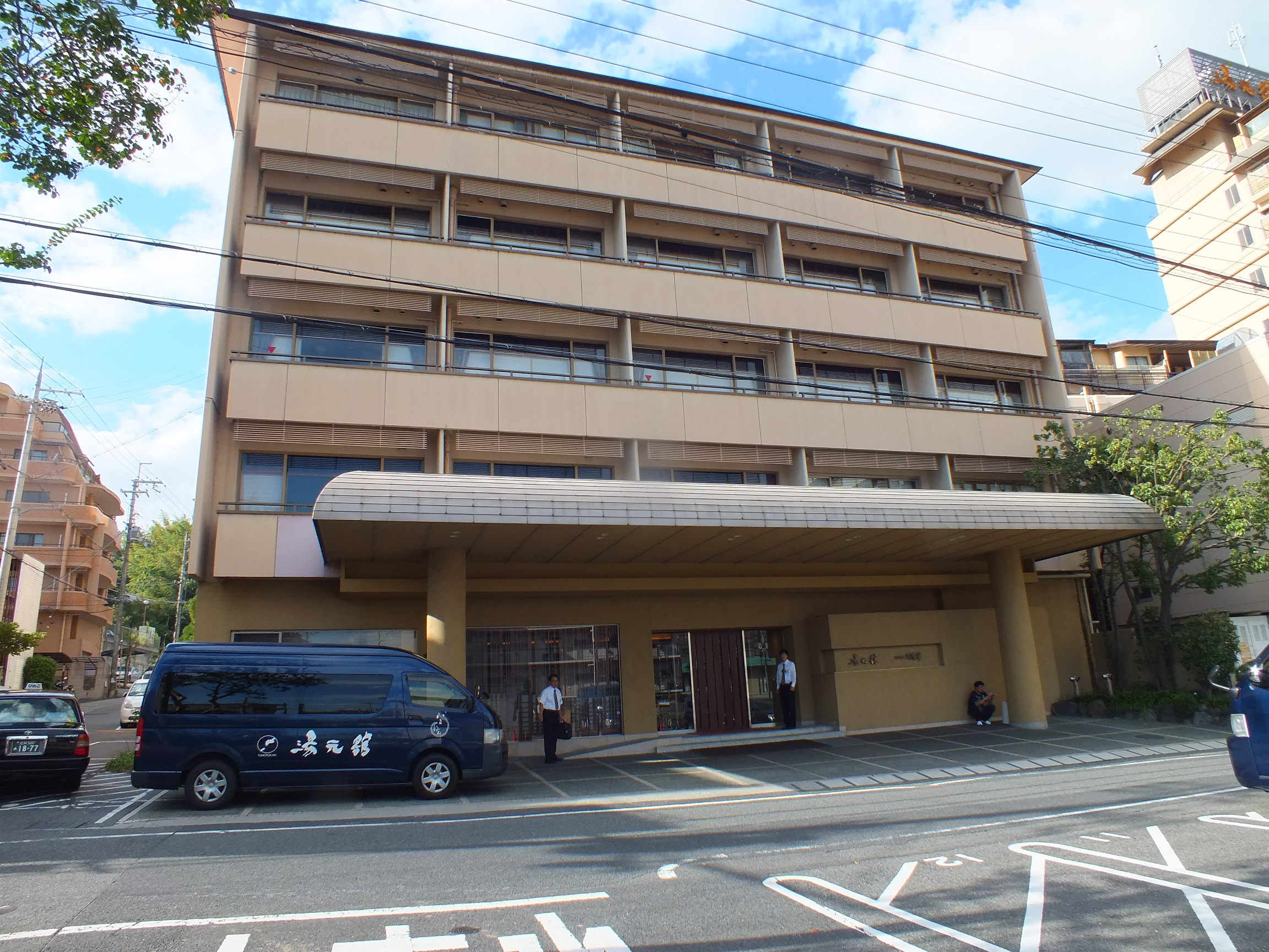 Yumotokan-Ogoto onsen おごと温泉 湯元舘